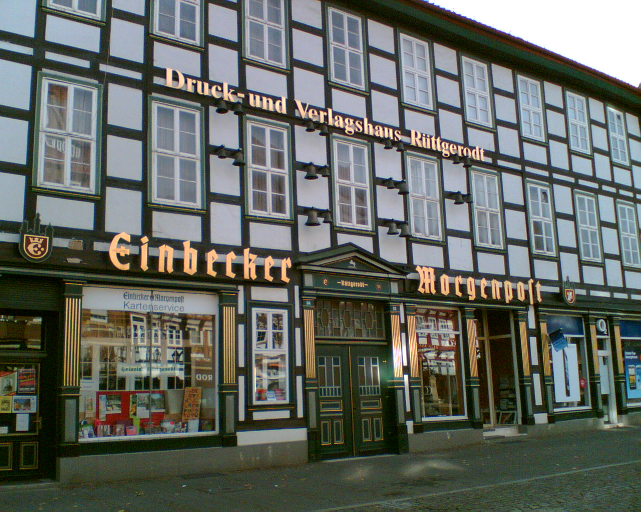 Druck- und Verlagshaus Rüttgerodt, Einbecker Morgenpost